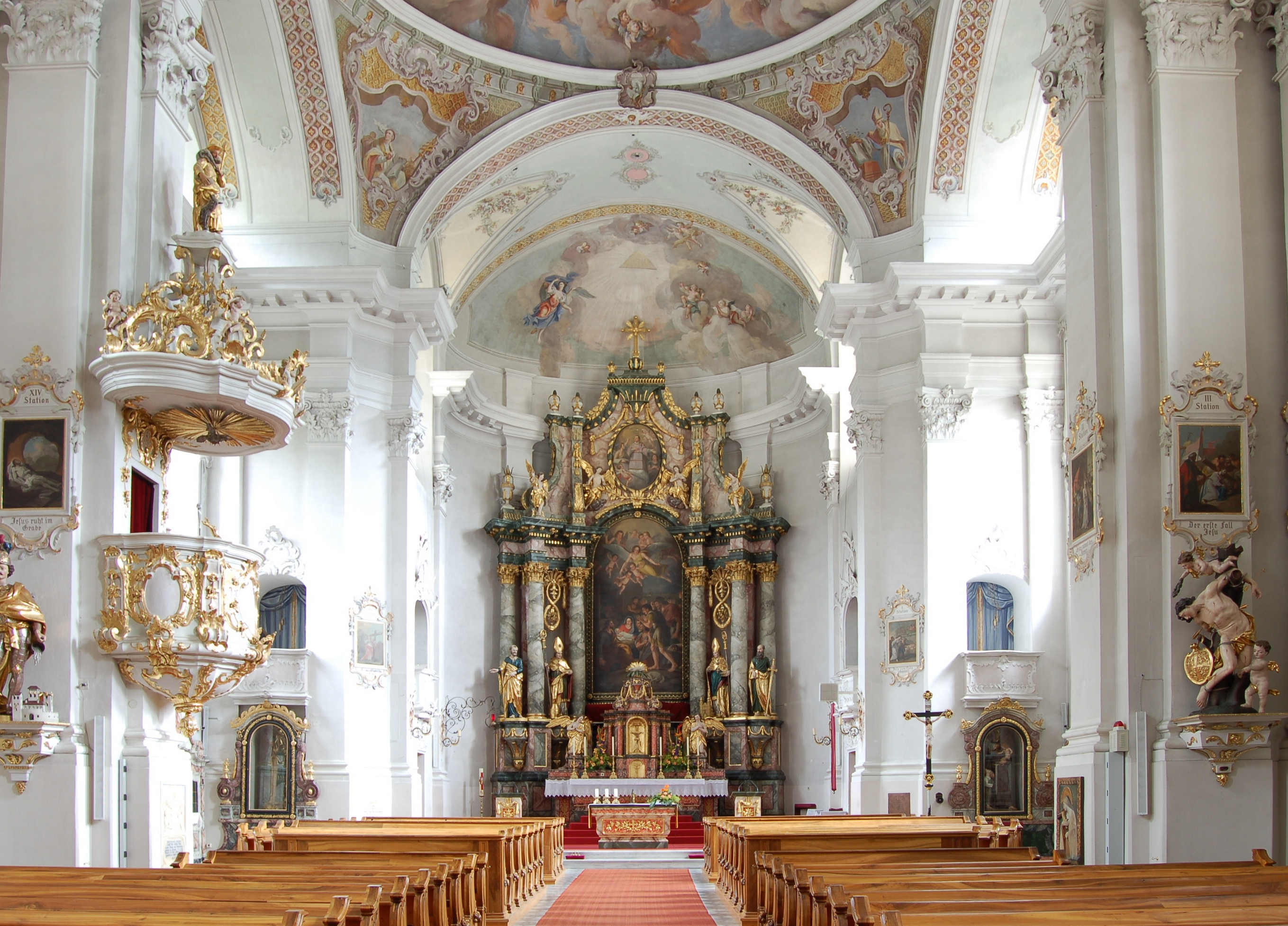 Der Innenraum der Matreier Pfarrkirche (Gemeinde Matrei in Osttirol)